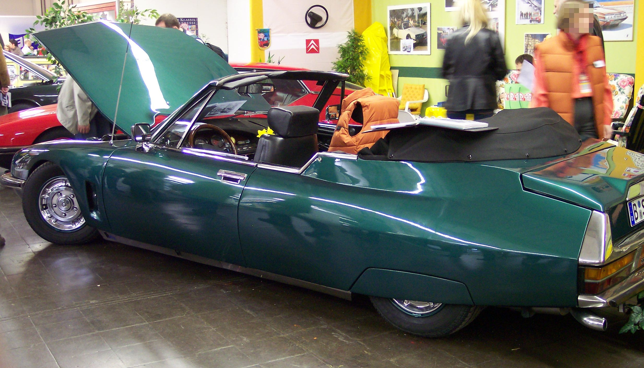 Citroen SM Cabrio